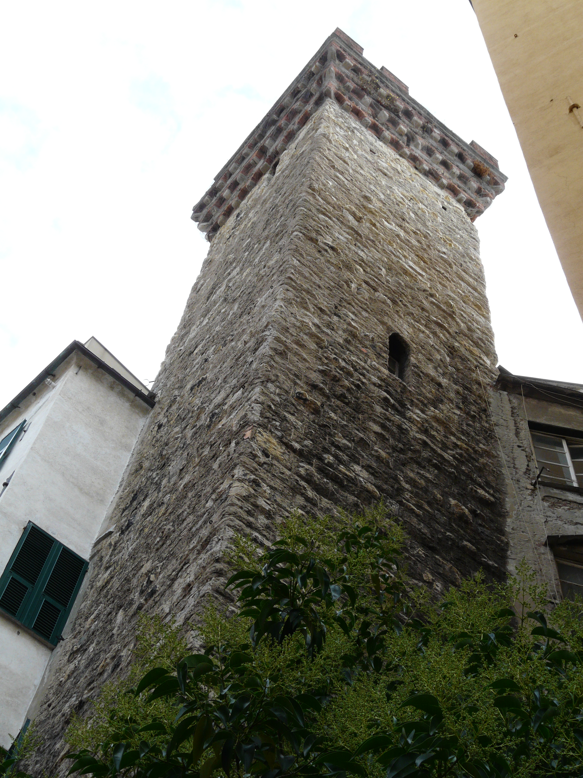 Torre degli Embriaci, Genova, Liguria, Italia